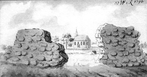 J. C. Brotze joonistus 1796. aastast. Vaade linnusemüüride vahelt kõrvalasuvale luteri kirikule.